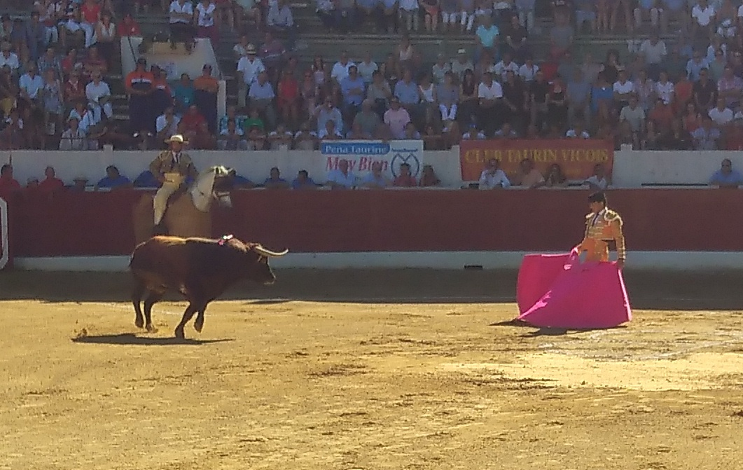 Ivan Fandiño toréant son dernier taureau (dont il obtient quelques minutes plus tard une oreille) à la corrida d'Aire-sur-l'Adour, avant de mourir, blessé lors d'une passe offerte par Del Alamo